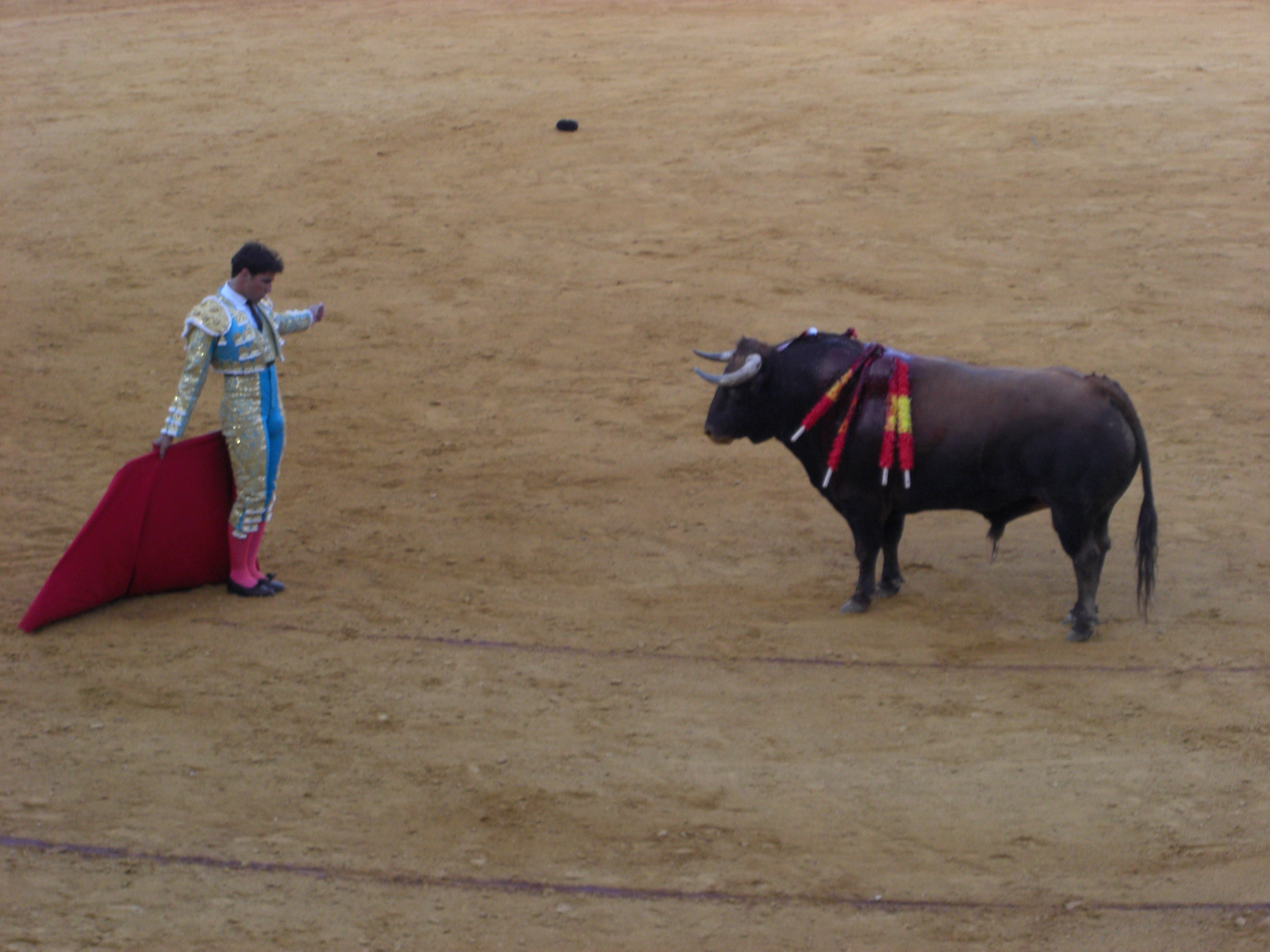 Fran Rivera en las fiestas Colombinas 2008 en Huelva (España)